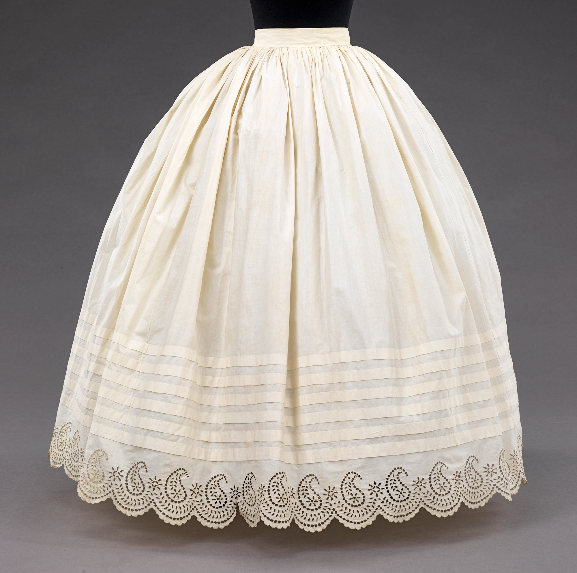 American; Petticoat